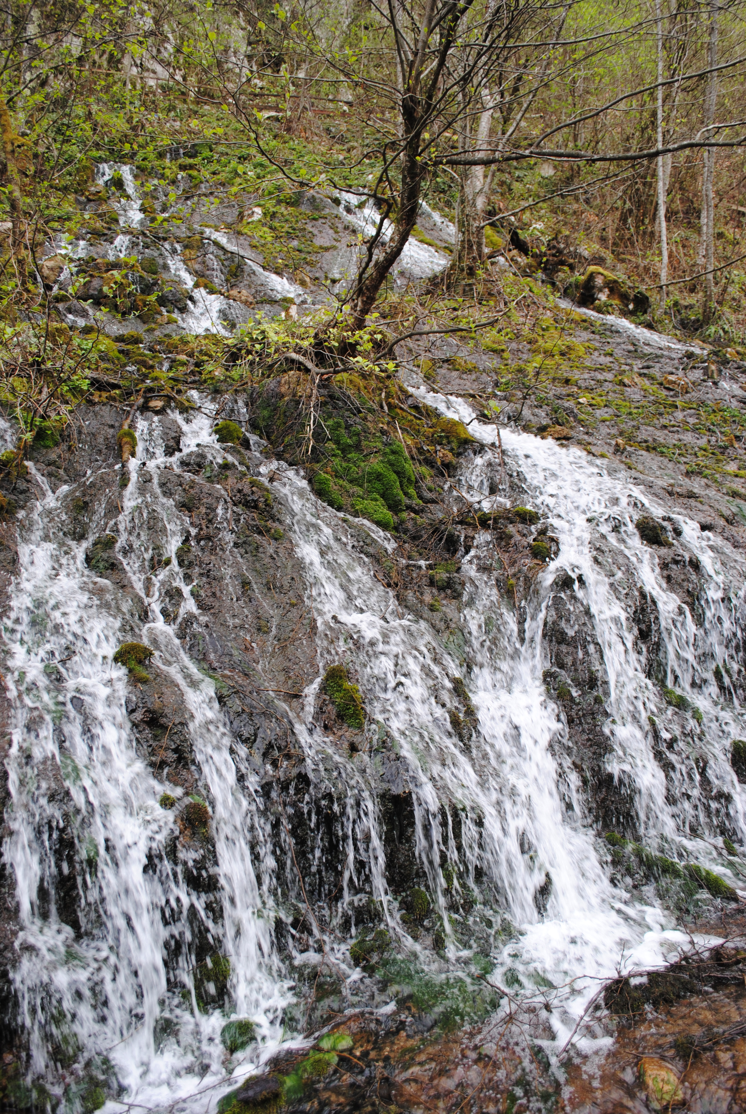 Ladjevac Ово је фотографија заштићеног природног добра у Србији под шифром: НП03 This is a a photo of a natural area in Serbia with ID: НП03